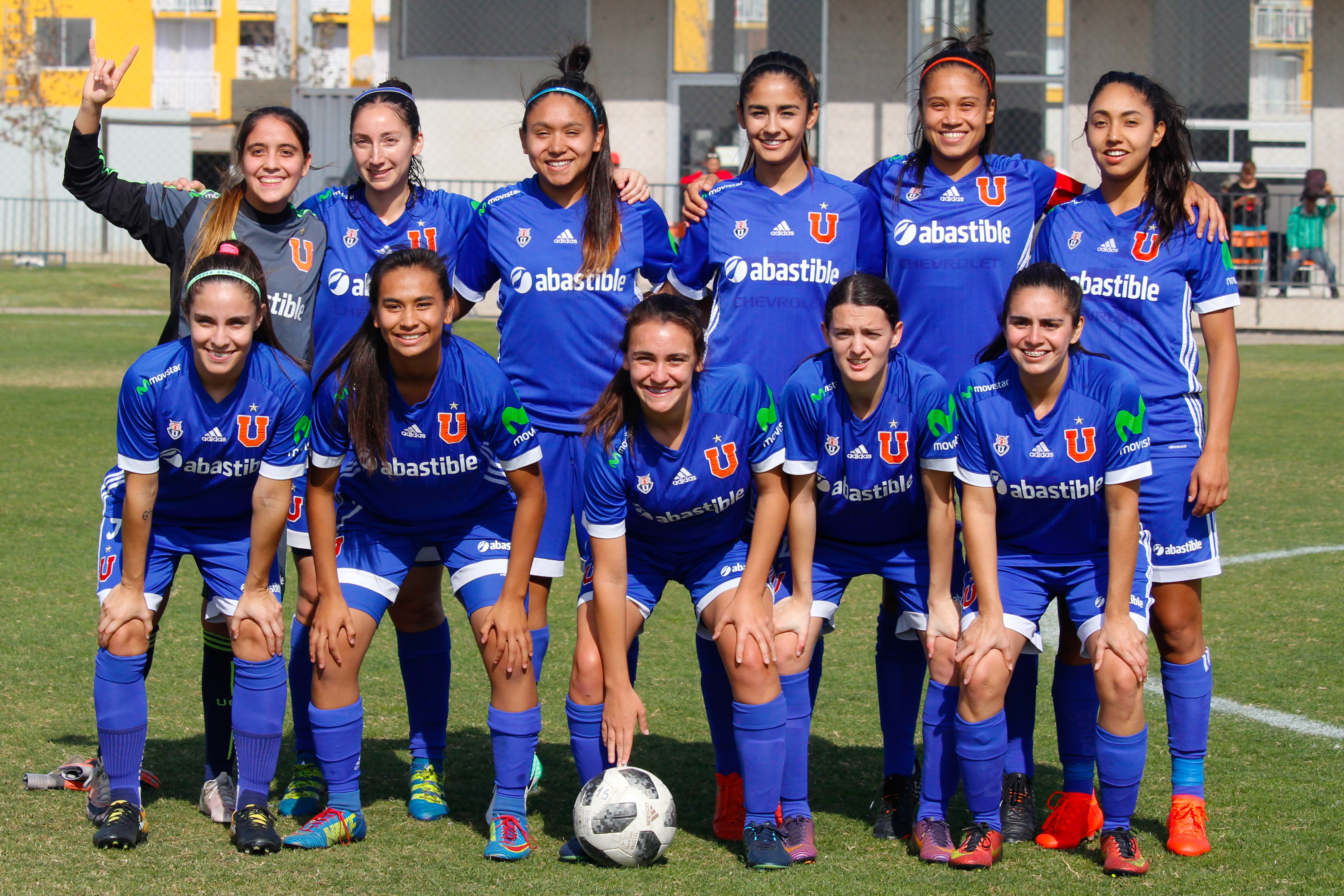 Equipo de Universidad de Chile Adulta femenino que disputa la primera fecha del Campeonato de Fútbol Femenino Chile 2018